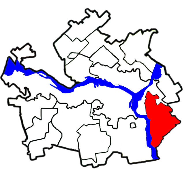 Любимівська сільська рада, Дніпропетровський район